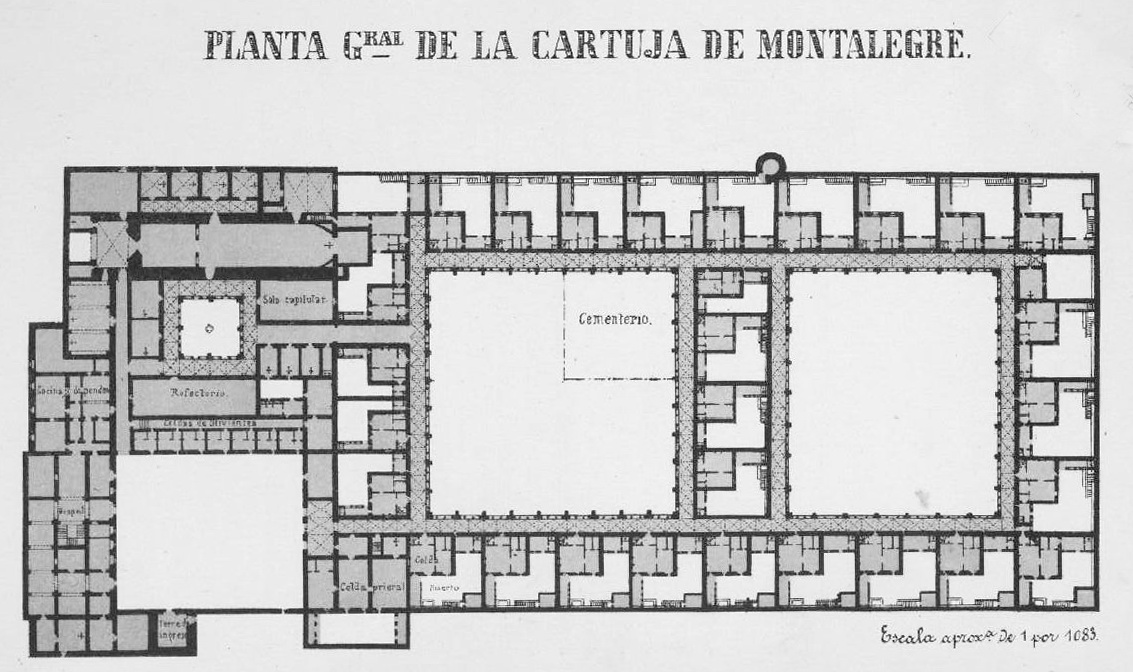 Planta de la Cartoixa de Montalegre (Tiana, Catalunya), dibuixada per l'arquitecte Modest Fossas i Pi (1834-1904), al seu estudi de 1884.